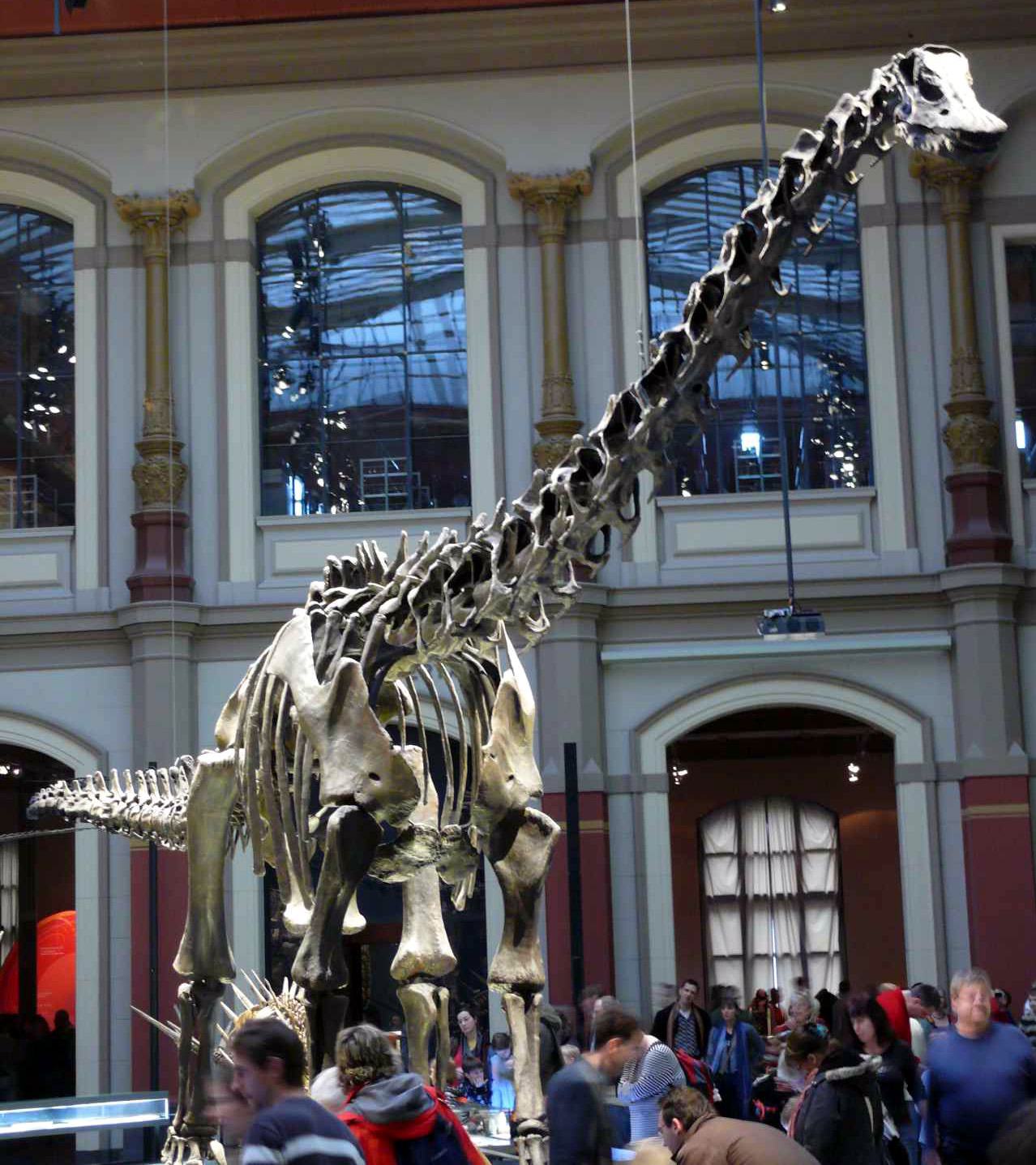 Diplodocus carnegi, Naturkundemuseum Berlin